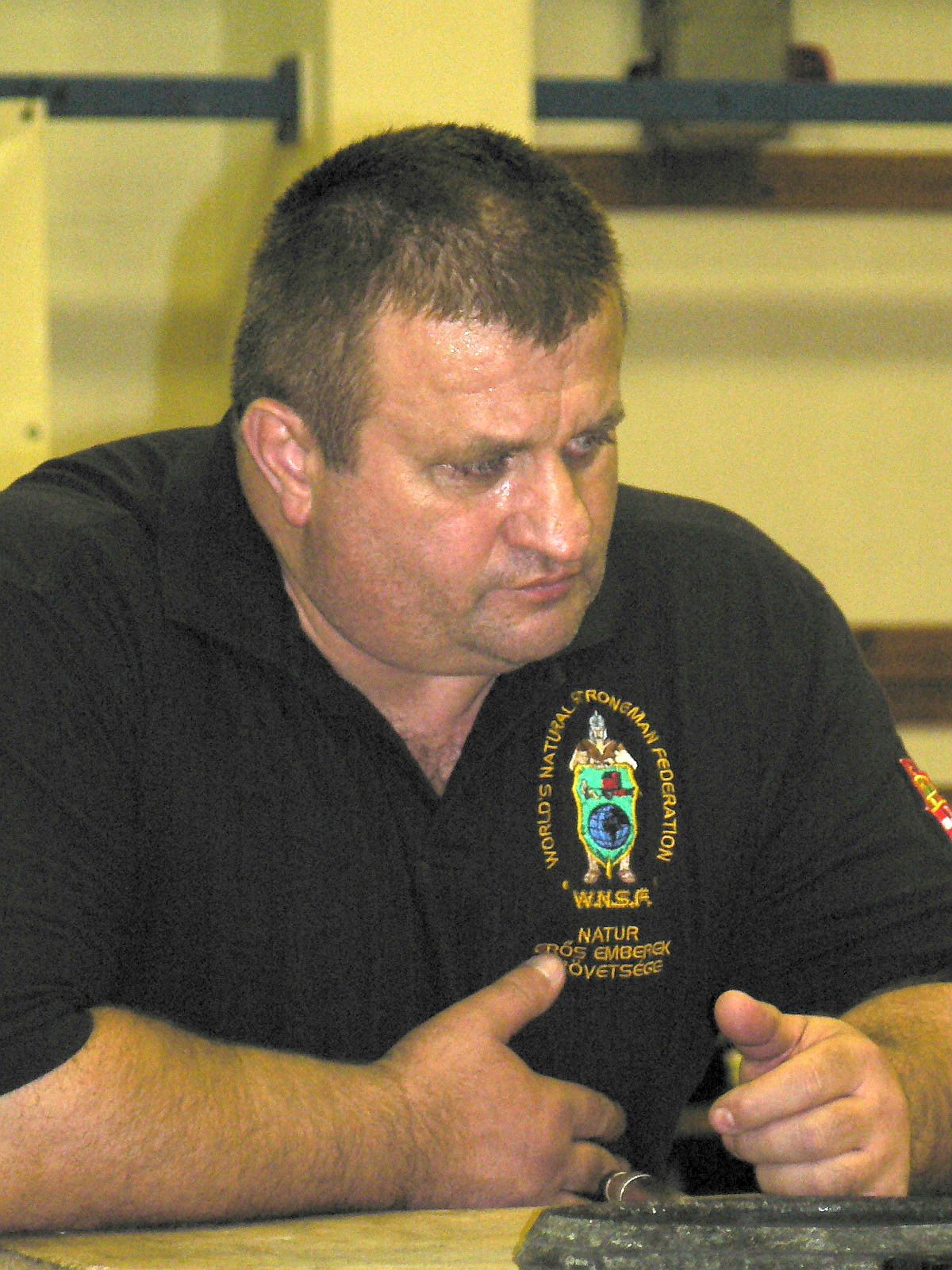 Fekete László 2007